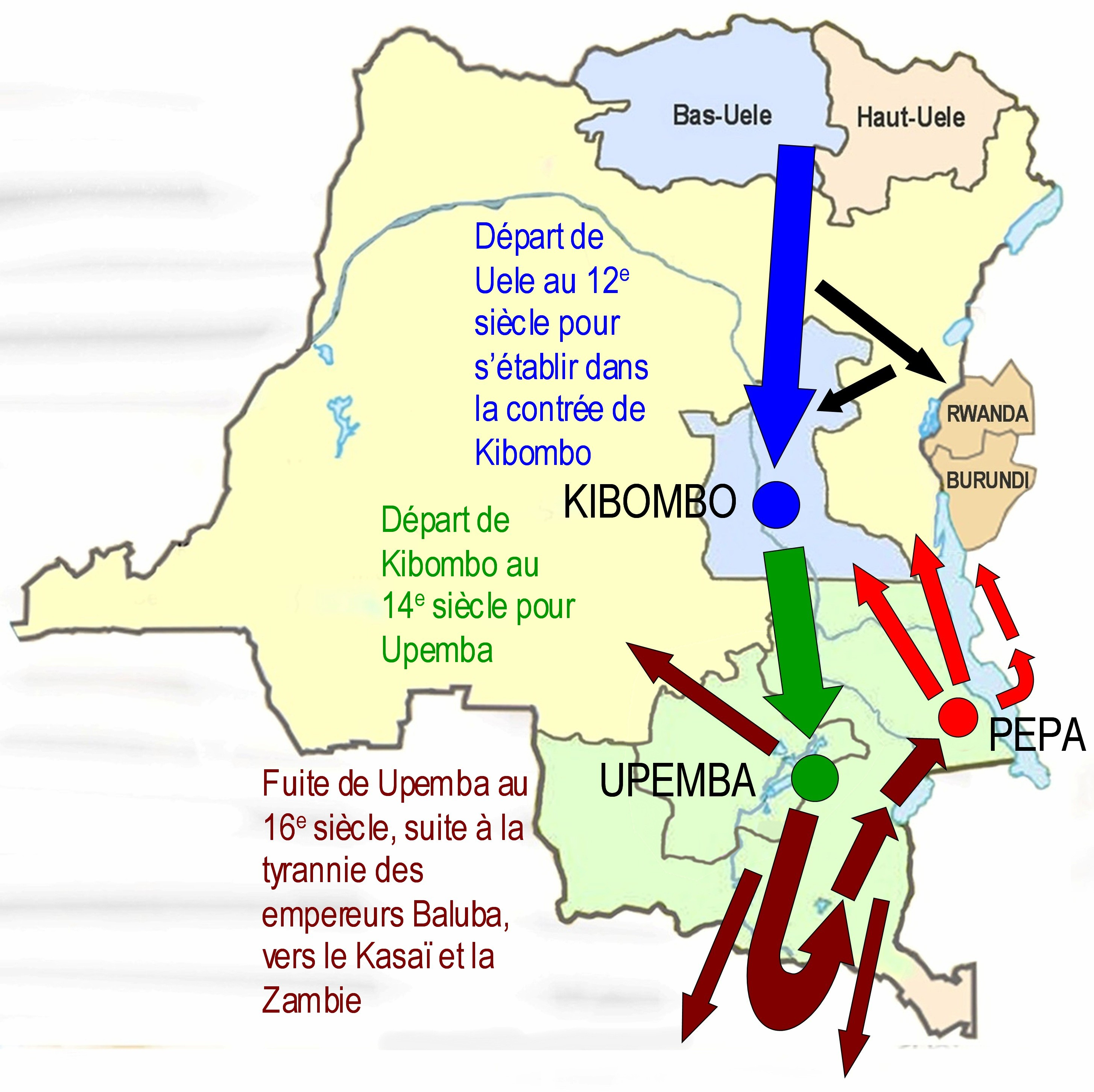 Selon l’éthologue Kibego Nabuvira Njangamwita les parcours que le peuple Bavira a effectué avant de s'établir dans la contrée d'Uvira à l'Est de la Rd Congo